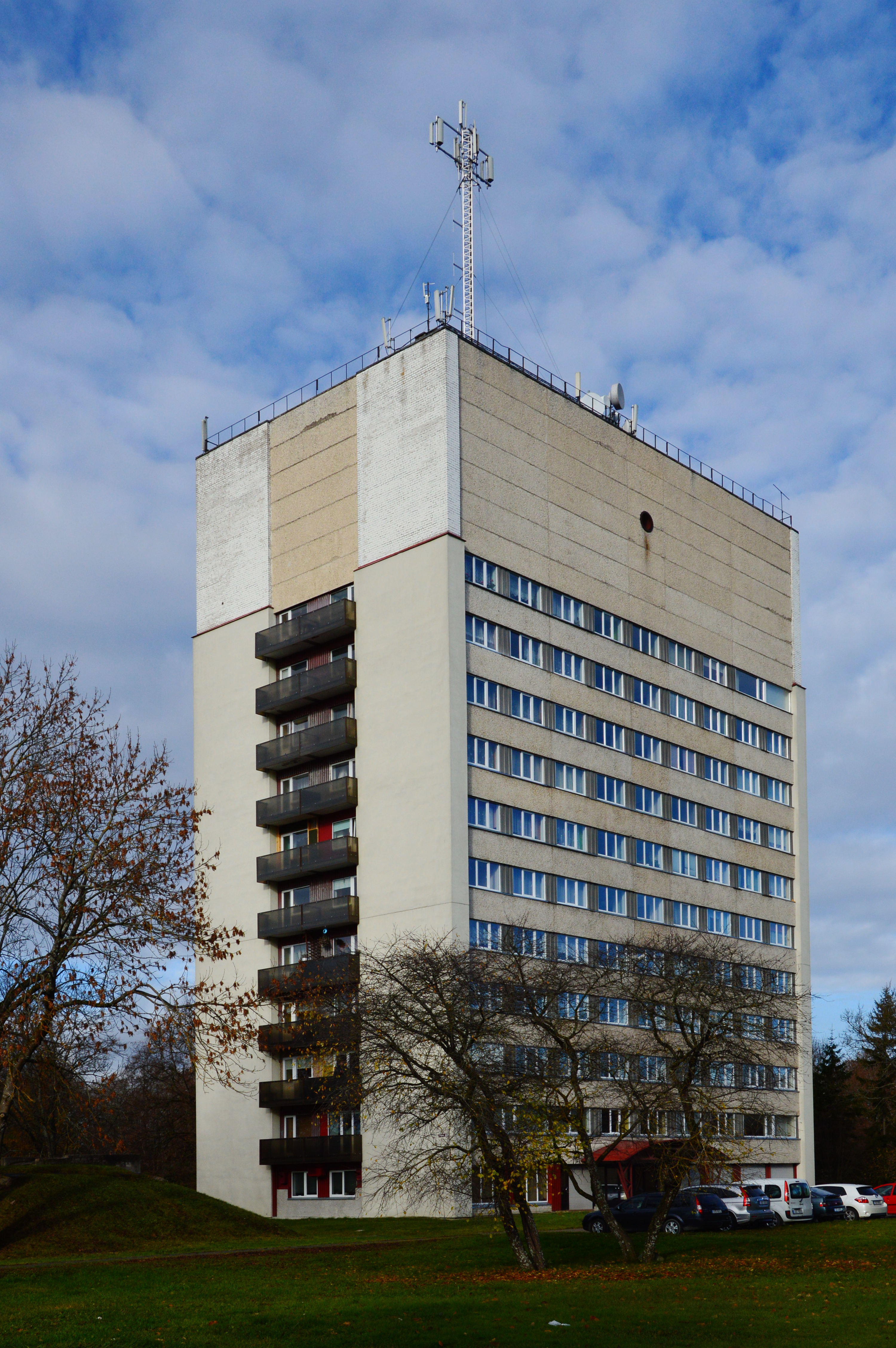 Paide veetorn-elamu – ainus kõrghoone Paides.